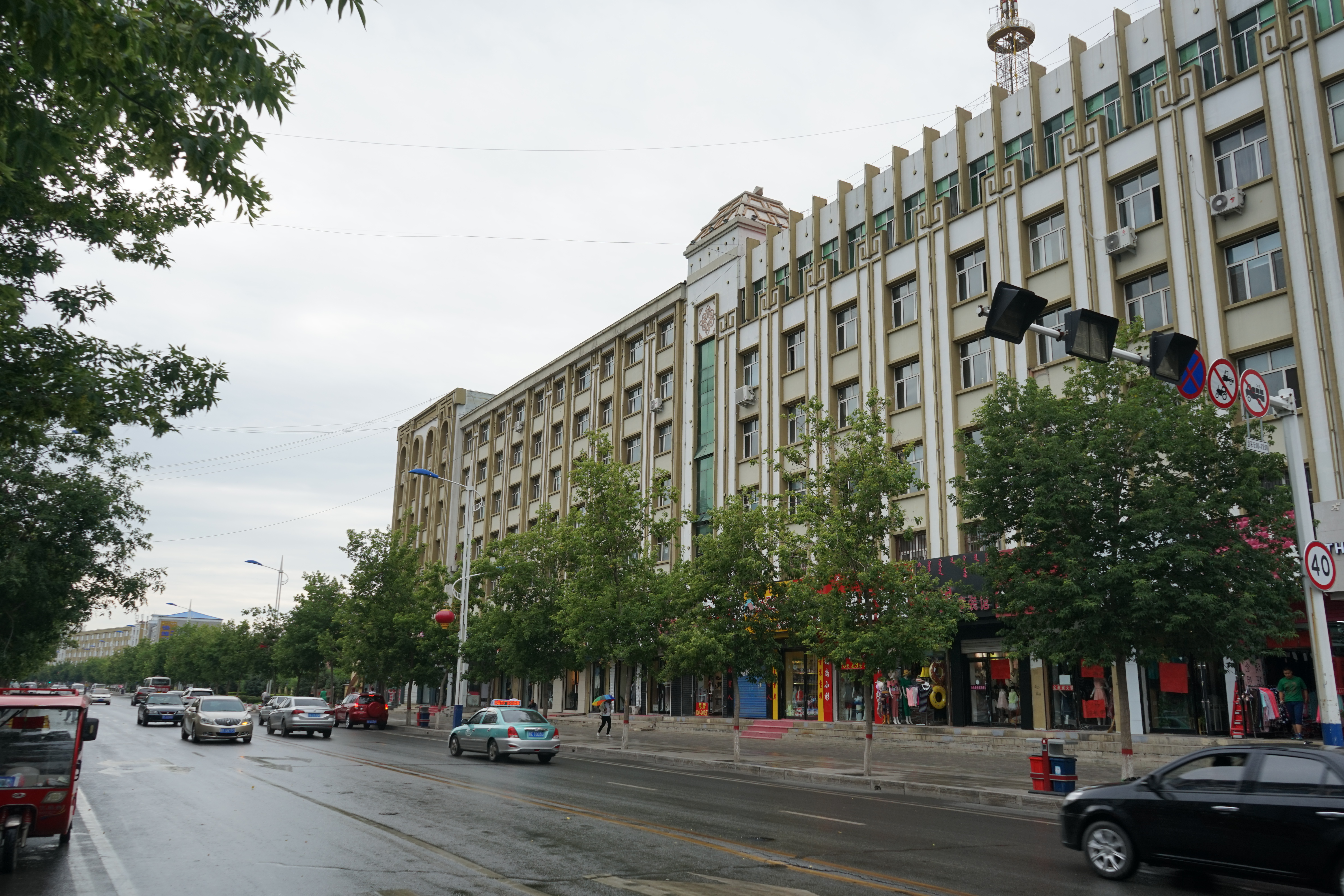 中文（中国大陆）: 泰康镇：文化广电体育局。